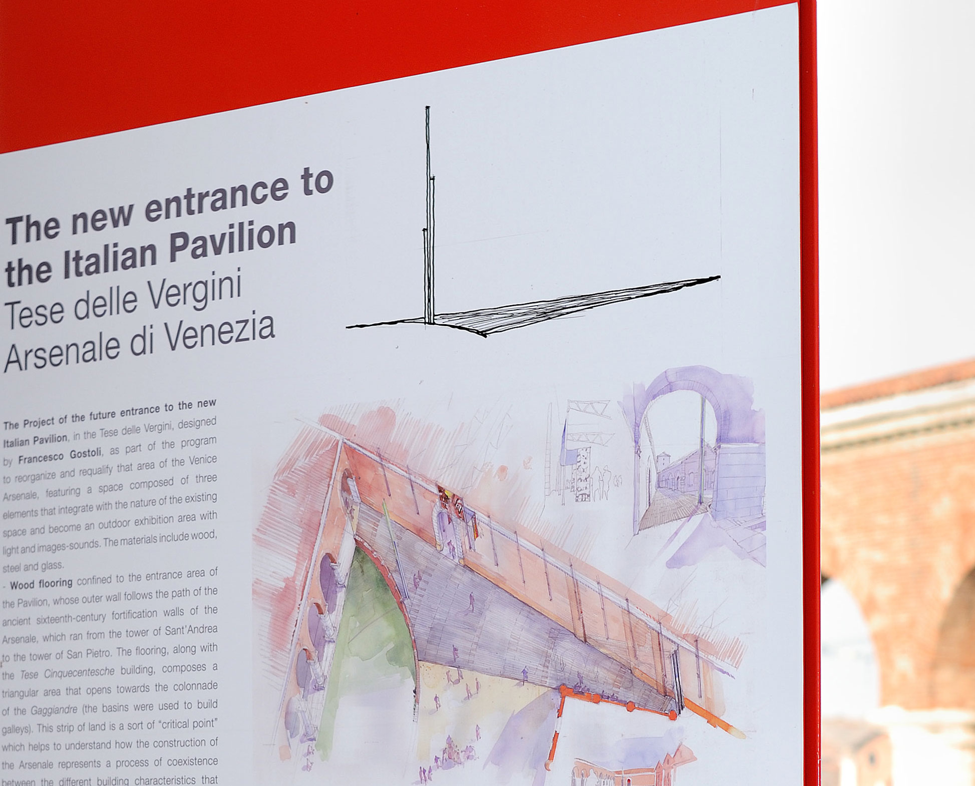 Padiglione Italiano alla Biennale di Venezia